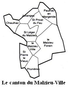 Le canton du Malzieu-Ville Image personnelle